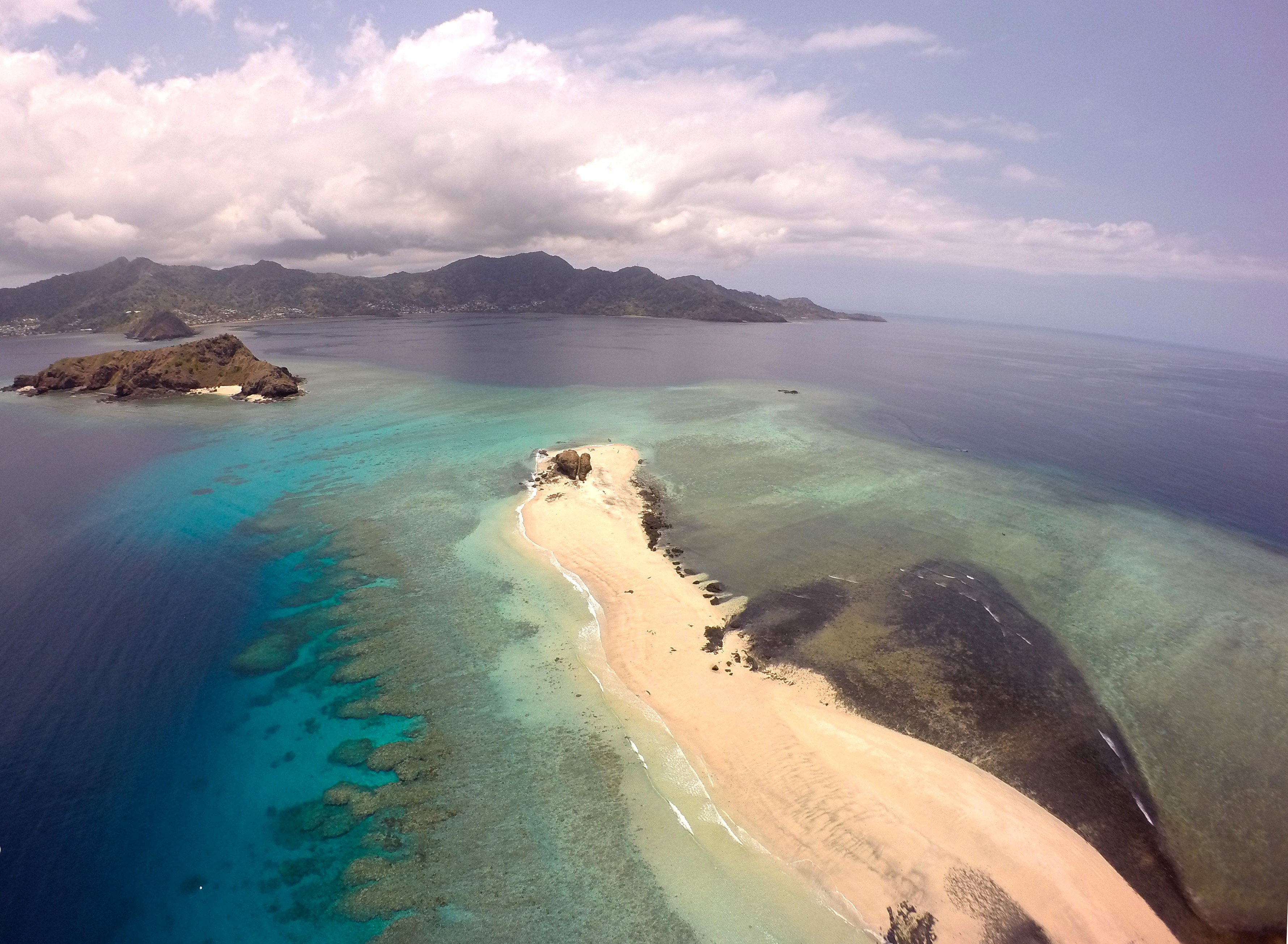 Survol drone des ilots choisils et prise de vue du récif frangeant. Un des plus dynamiques de l'île de Mayotte, département français depuis 2011